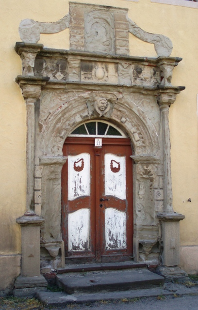 Portal des ehemaligen Herrenhauses in Elstertrebnitz/Greitschütz